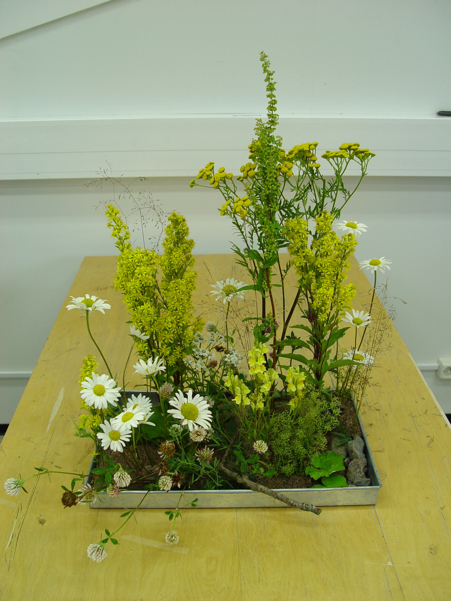 Asetelma - vegetatiivinen tyylisuunta